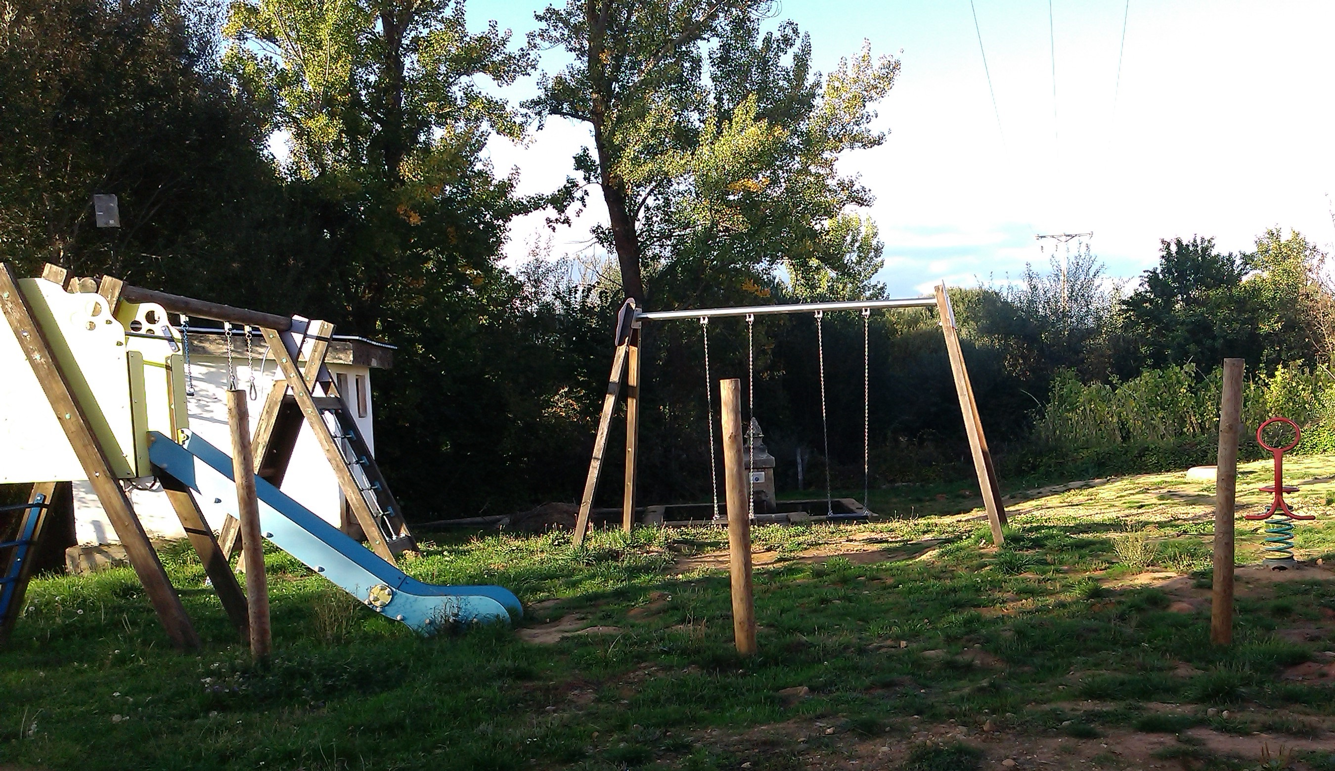 La fuente canalejas